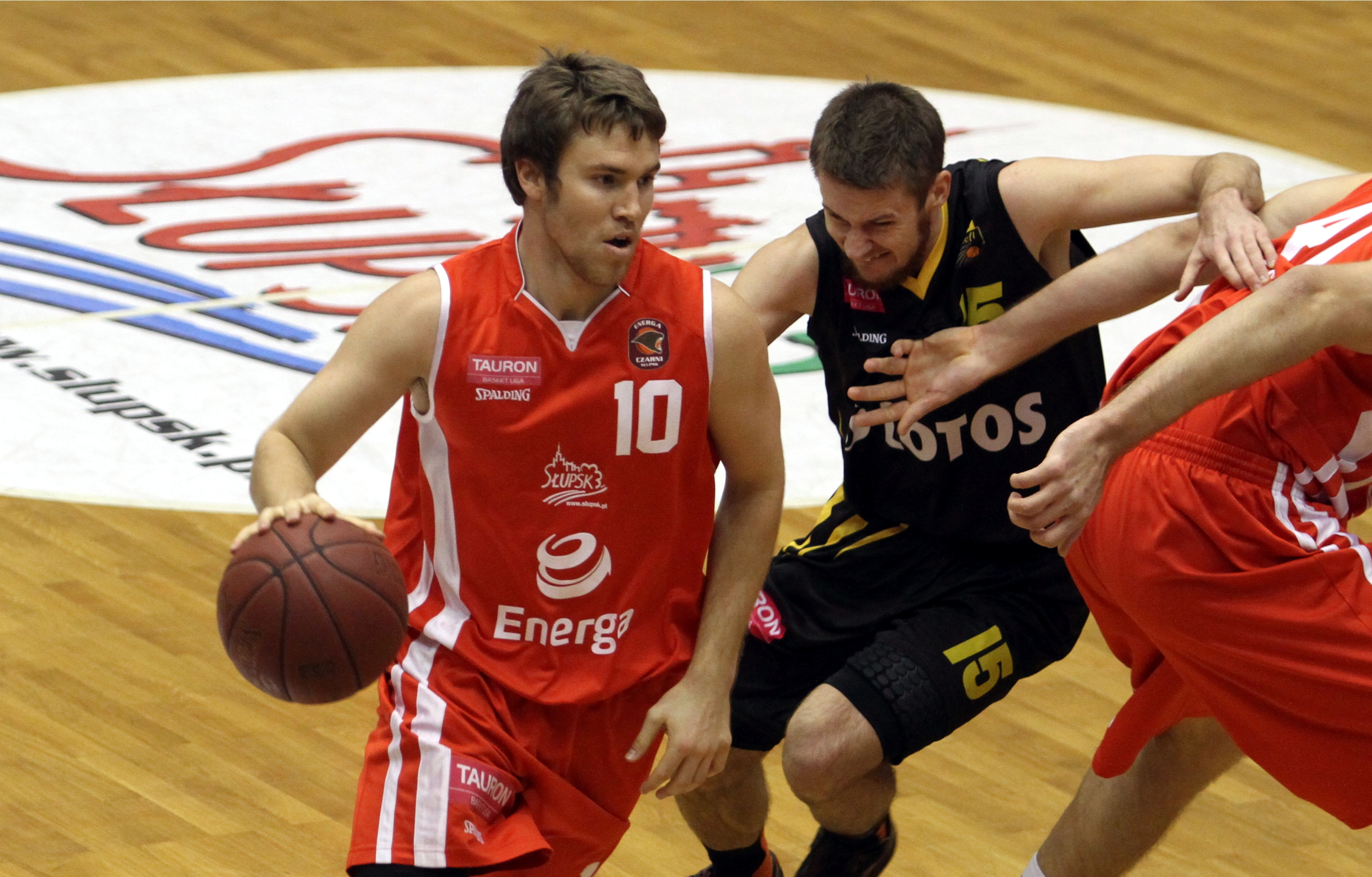 Jordan Hulls, Energa Czarni Słupsk